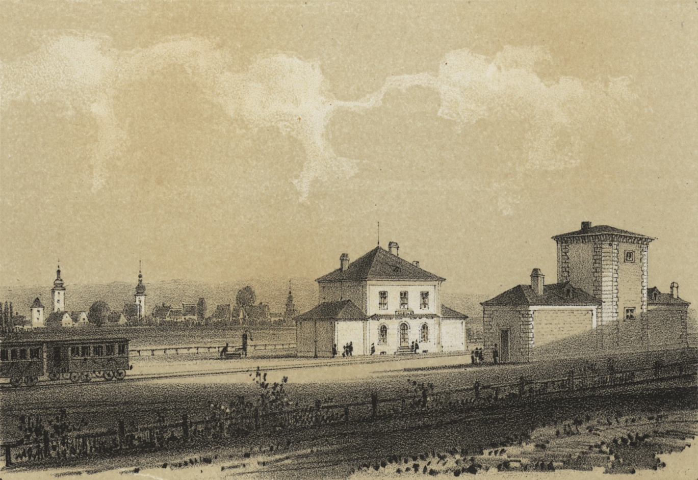 Nádraží Litovel, v pozadí město Litovel